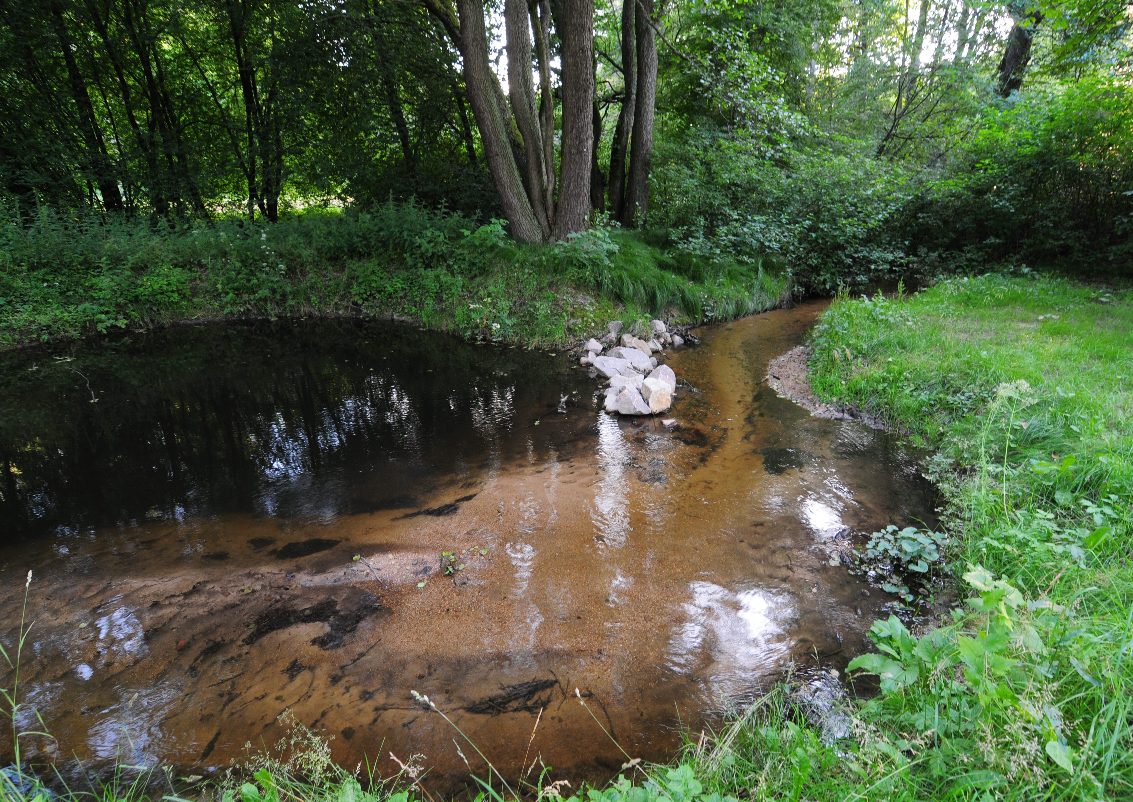 Gemeinde Bad Brambach, Kurpark Bad Brambach, der Röthenbach im Park (Vogtlandkreis, Freistaat Sachsen, Deutschland)